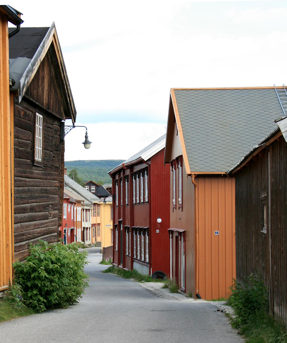 Finneveta, Røros, Norway.